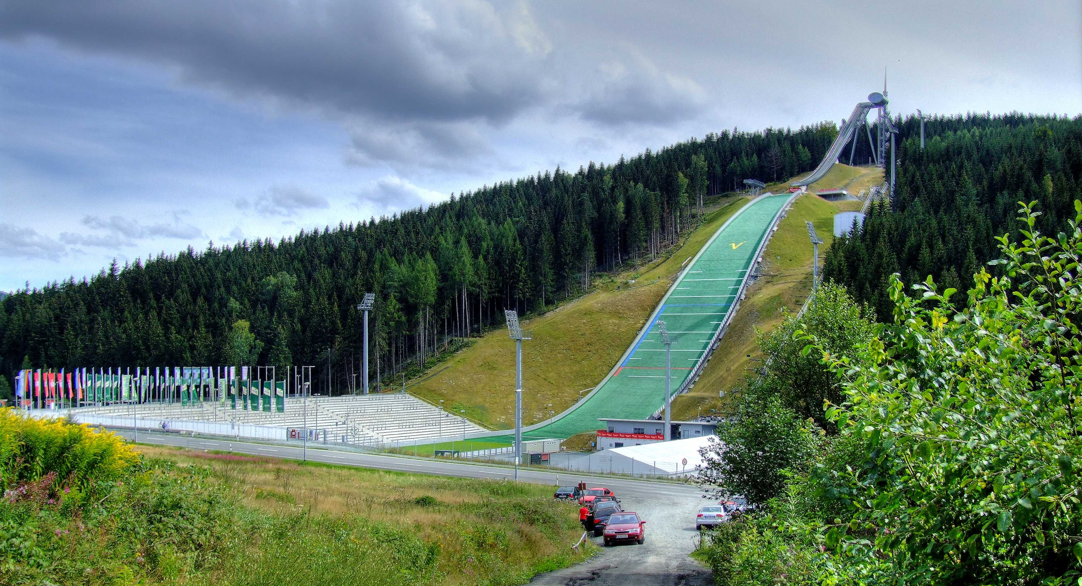 Vogtland Arena - Die modernste Sprungschanze Europas